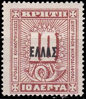 Служебная марка Критского государства с надпечаткой "Греция"